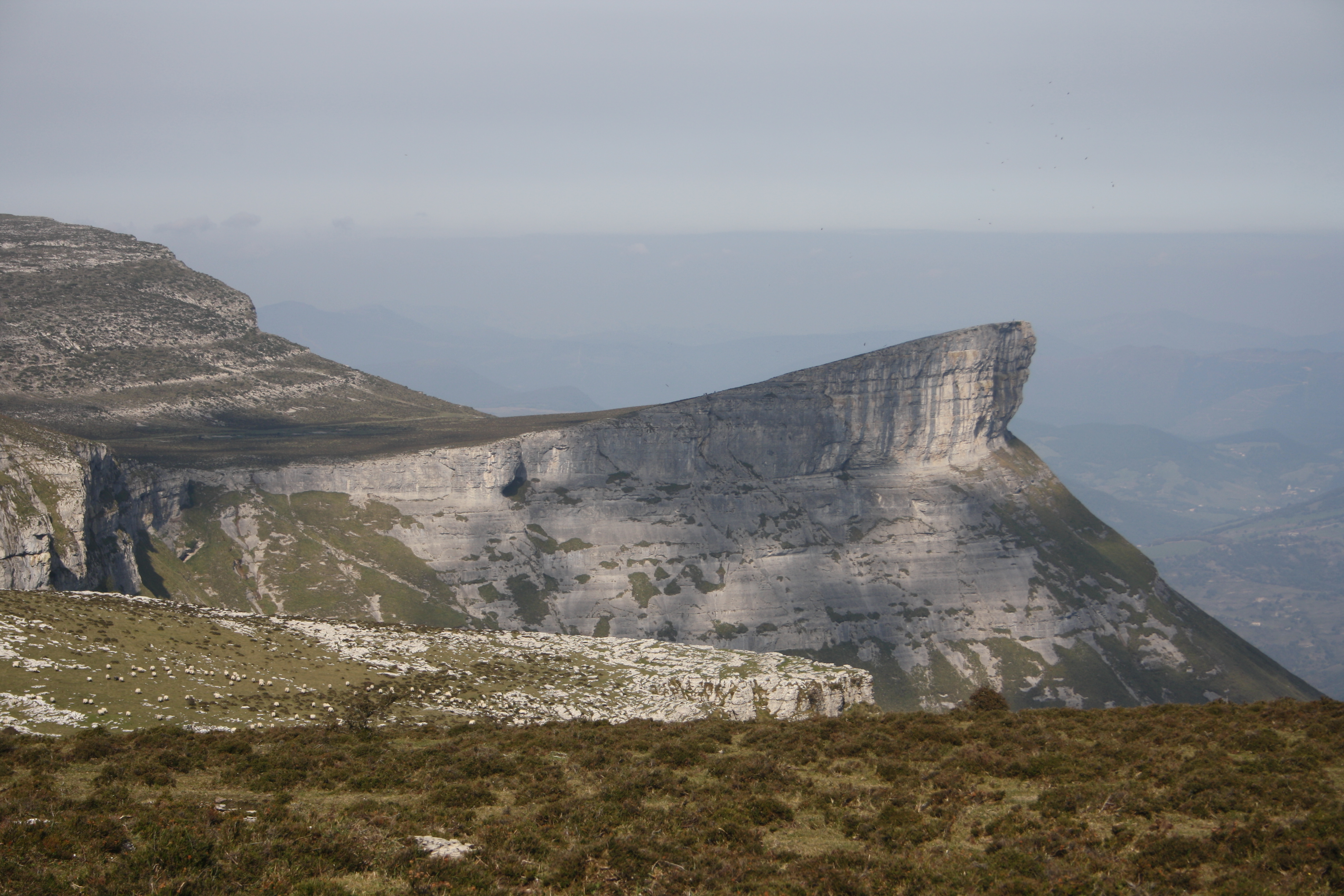 Escarpe que caracteriza Sierra Salvada